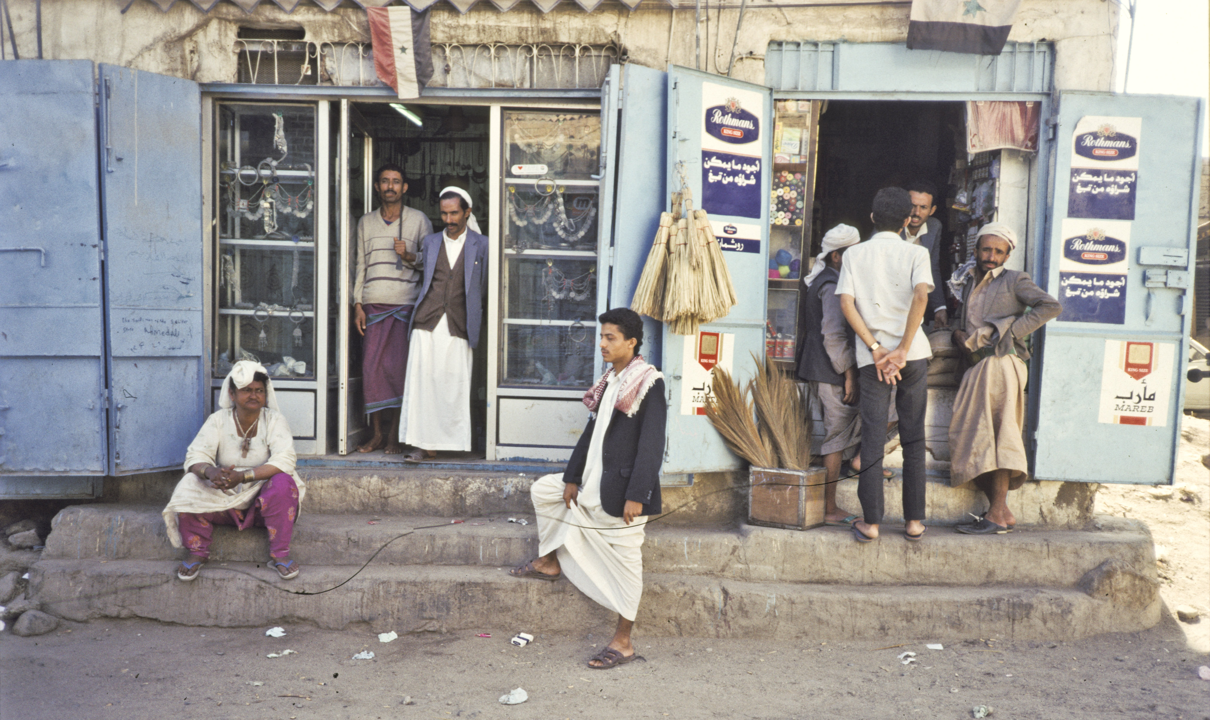 Yemen